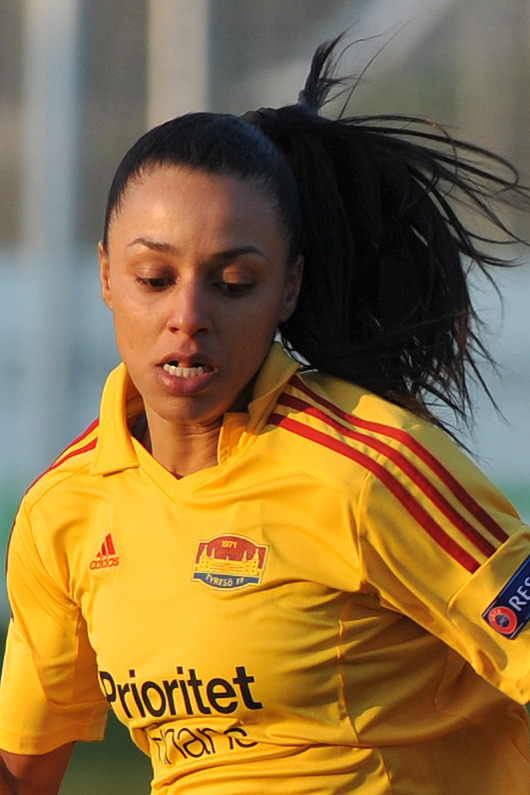 UEFA Women's Champions League 2013/14 SV Neulengbach - Tyresö FF Neulengbach, 29. März 2014 Rilany Aguiar da Silva